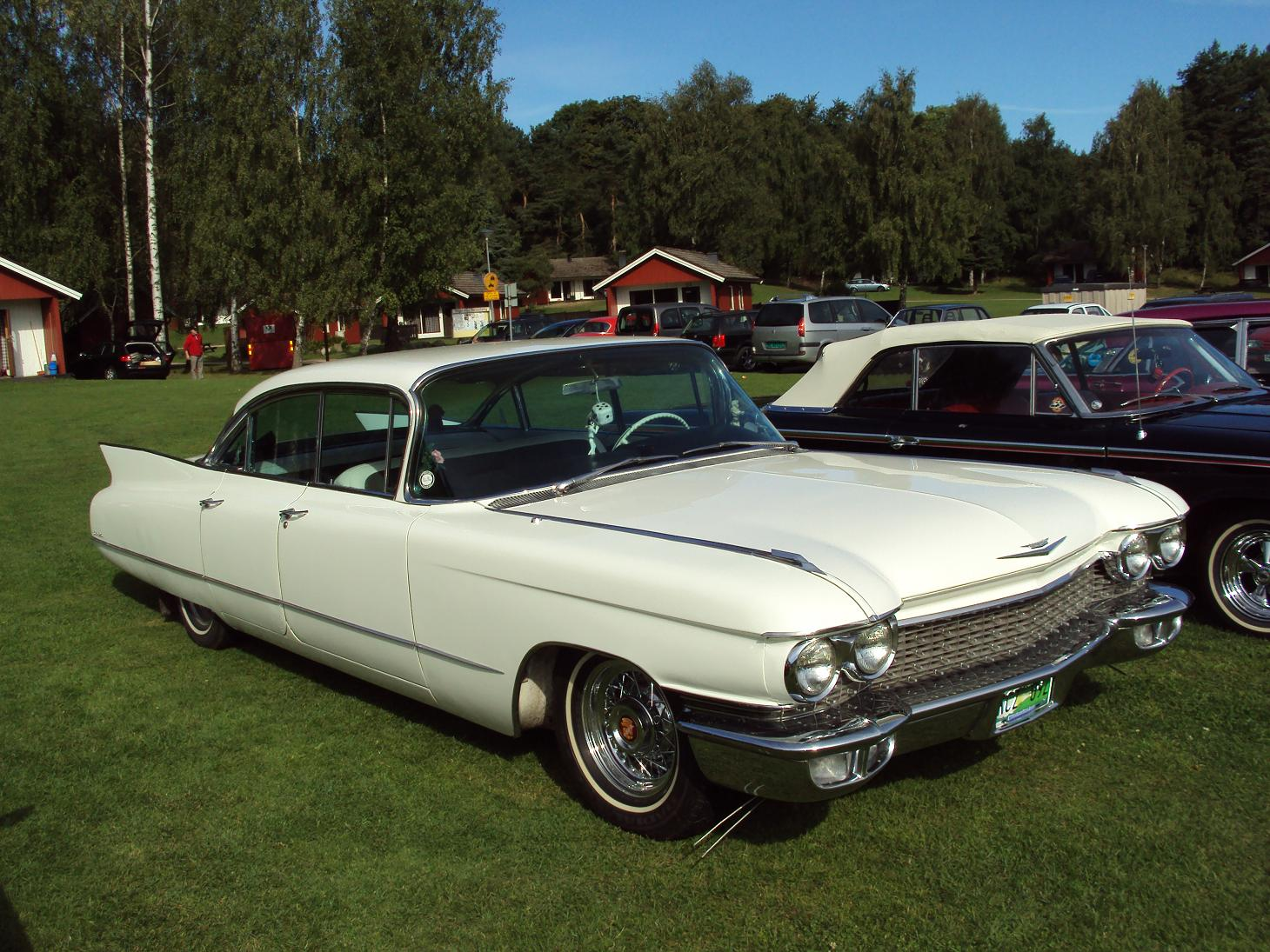 Cadillac Sedan De Ville 1960